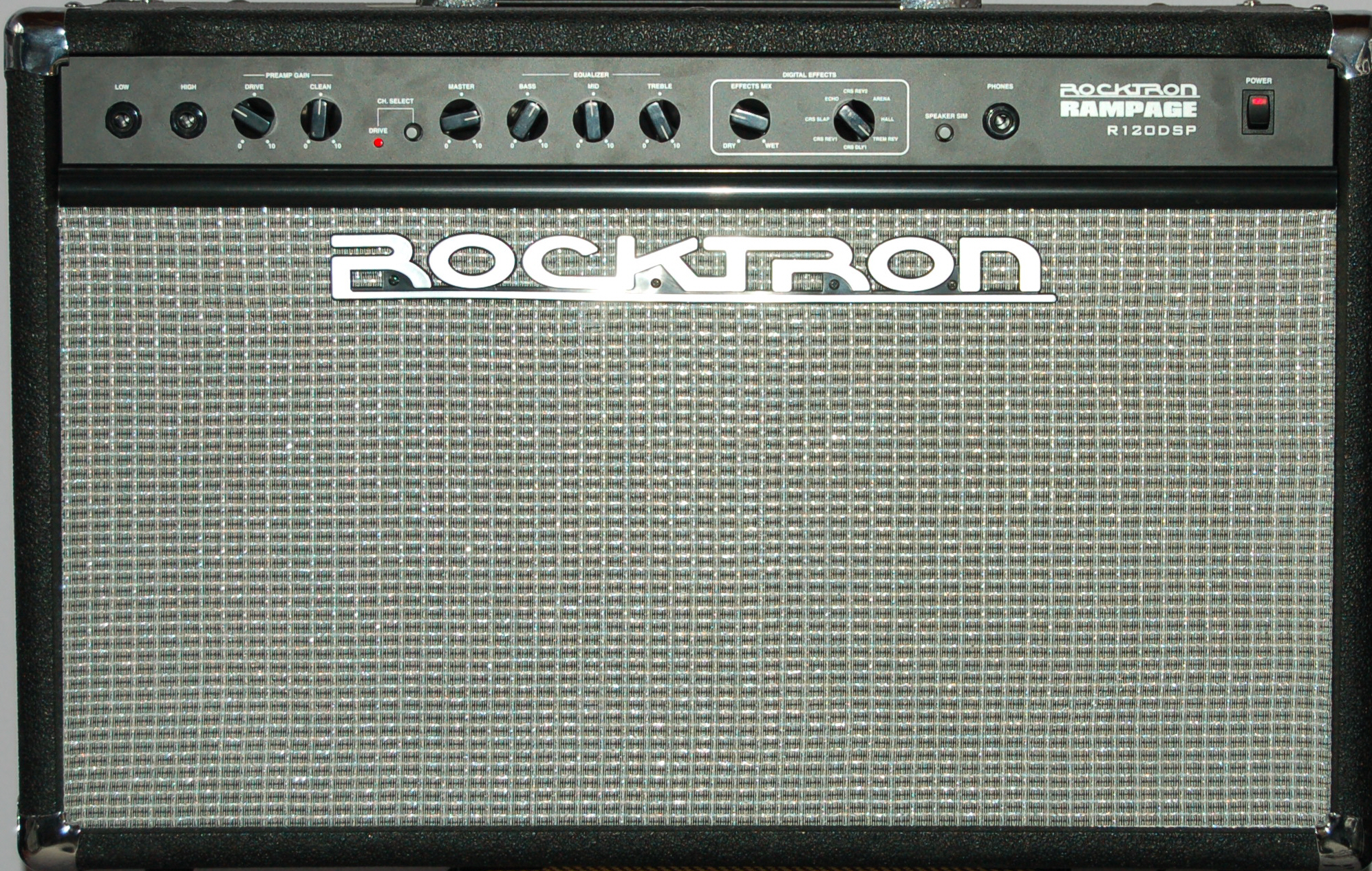 Rocktron Rampage R120 DSP Gitarrenverstärker